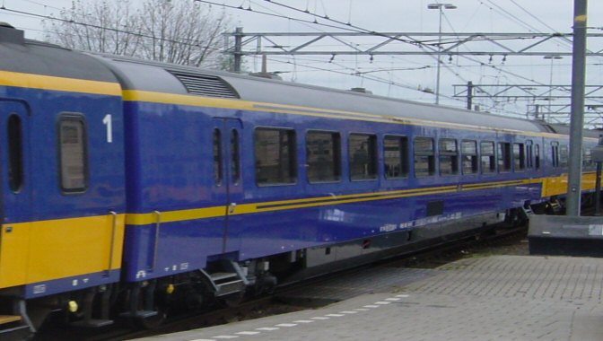 Nederlands koninklijk rijtuig, station Utrecht Centraal. Eigen foto Mark Voorendt, november 2004. Categorie:Afbeelding Nederlands spoorwegmaterieel